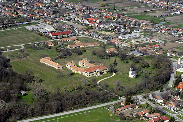 Légi fotó a Cziráky-kastélyról, Lovasberény